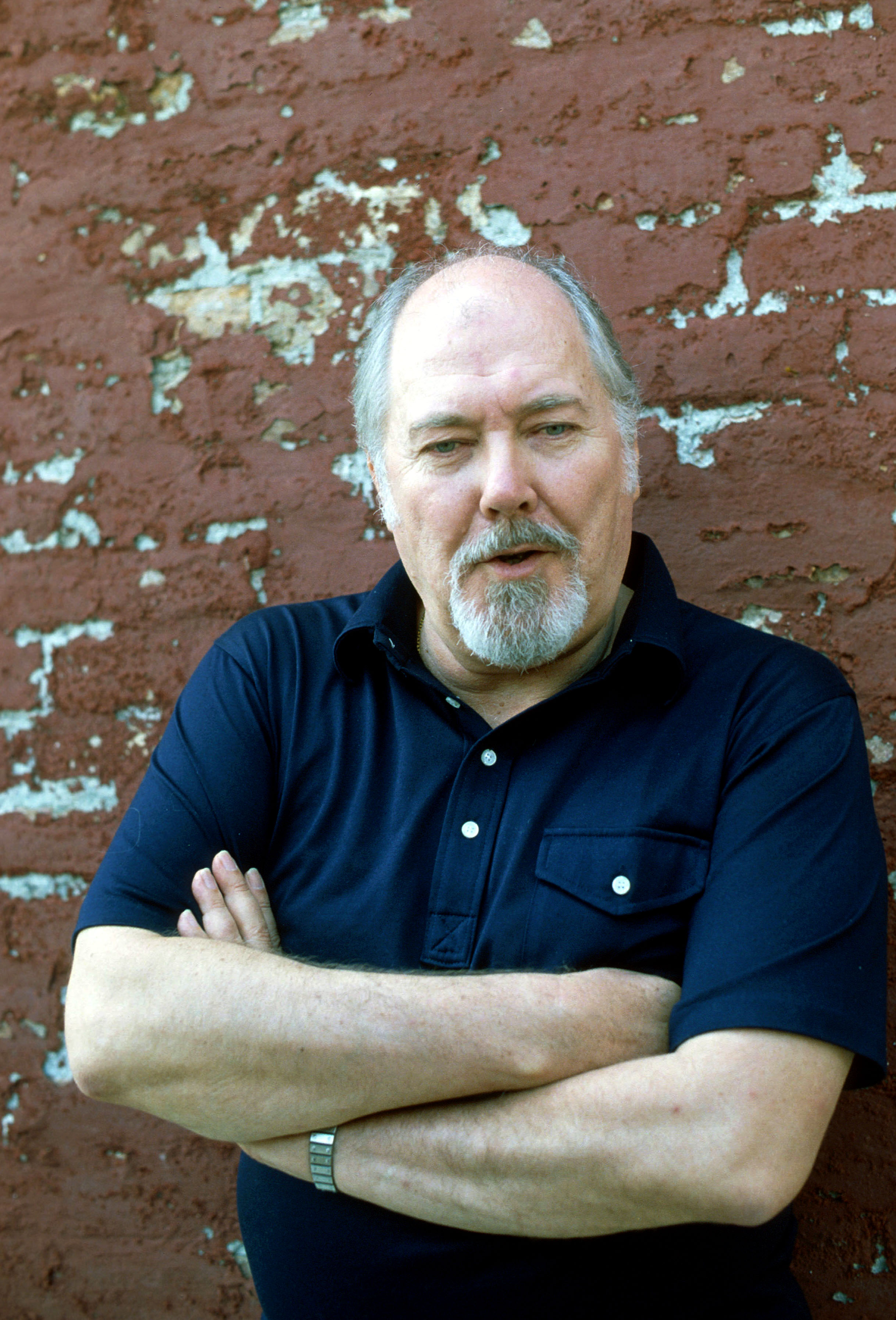 Il regista Robert Altman alla Mostra del Cinema di Venezia nel 1982